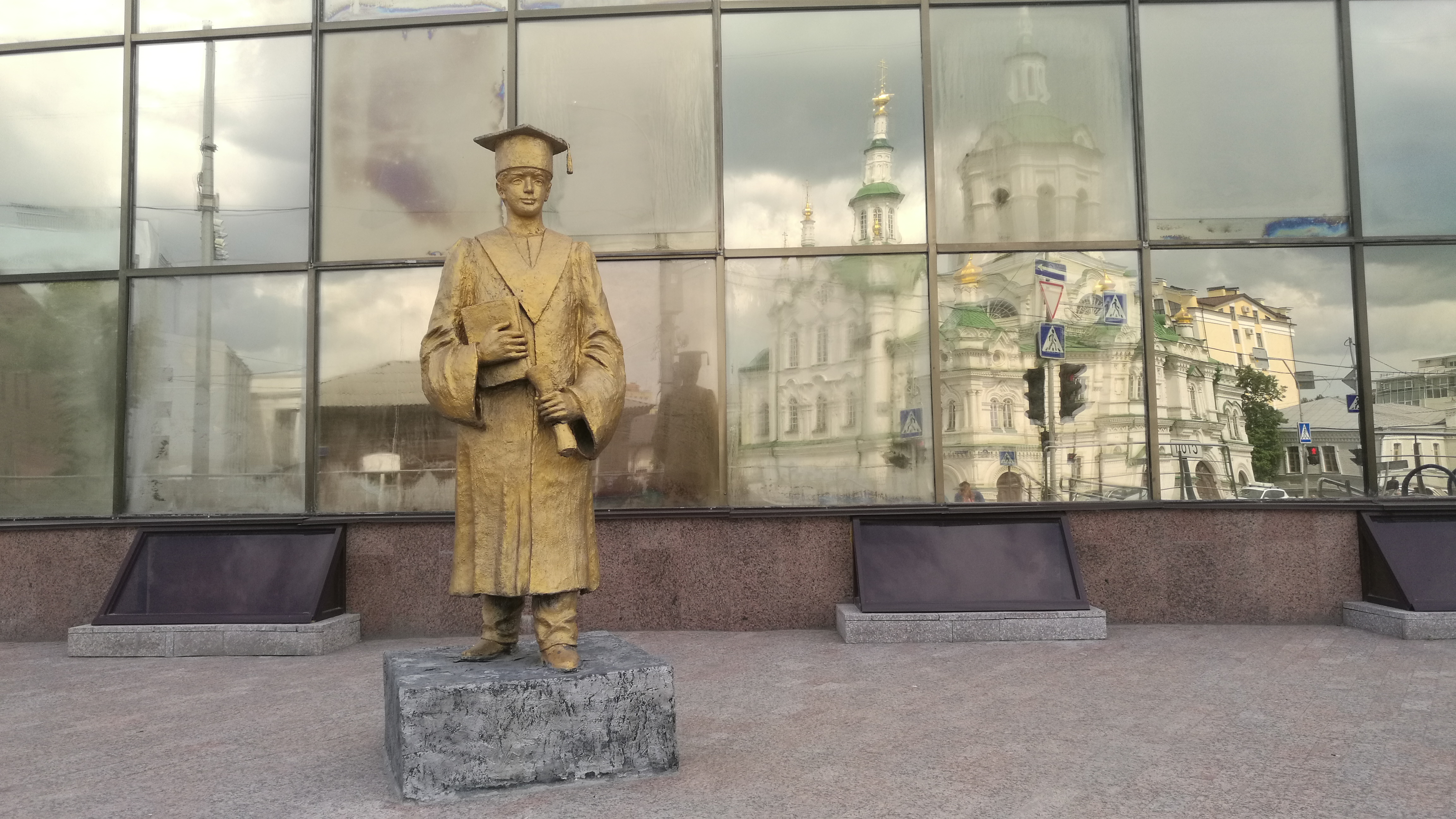 Monumento al studento. Tjumeno, Rusio.